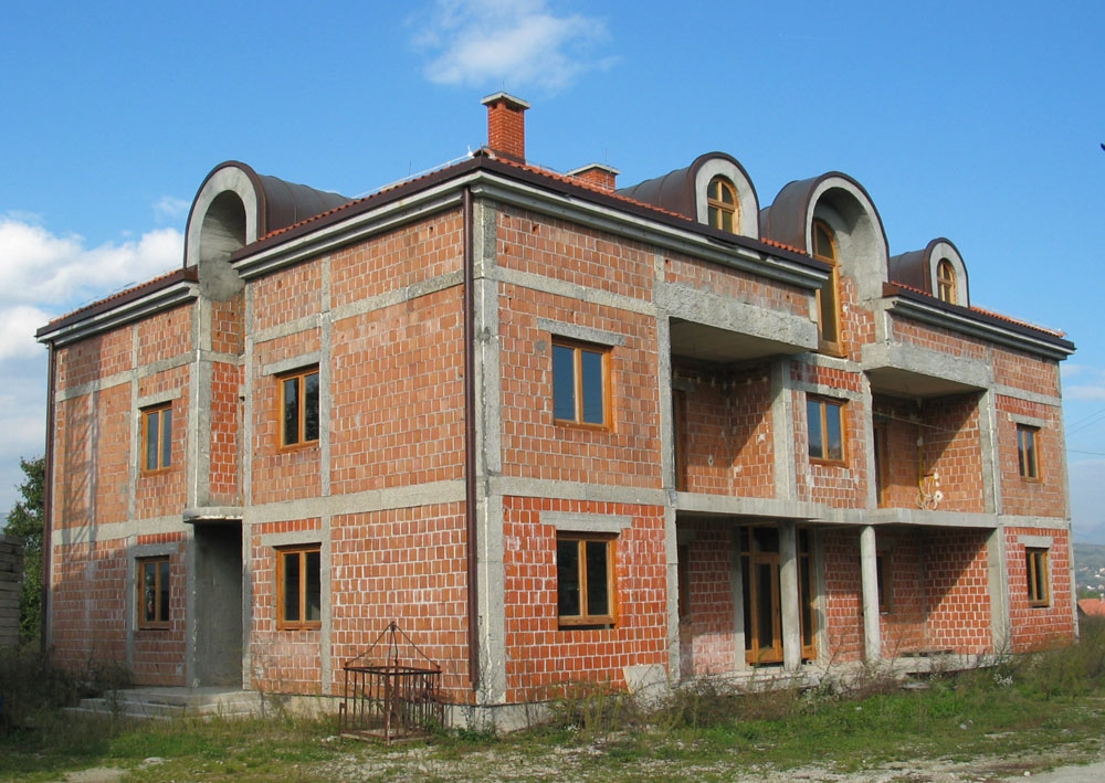 Novi župni stan u Bučićima